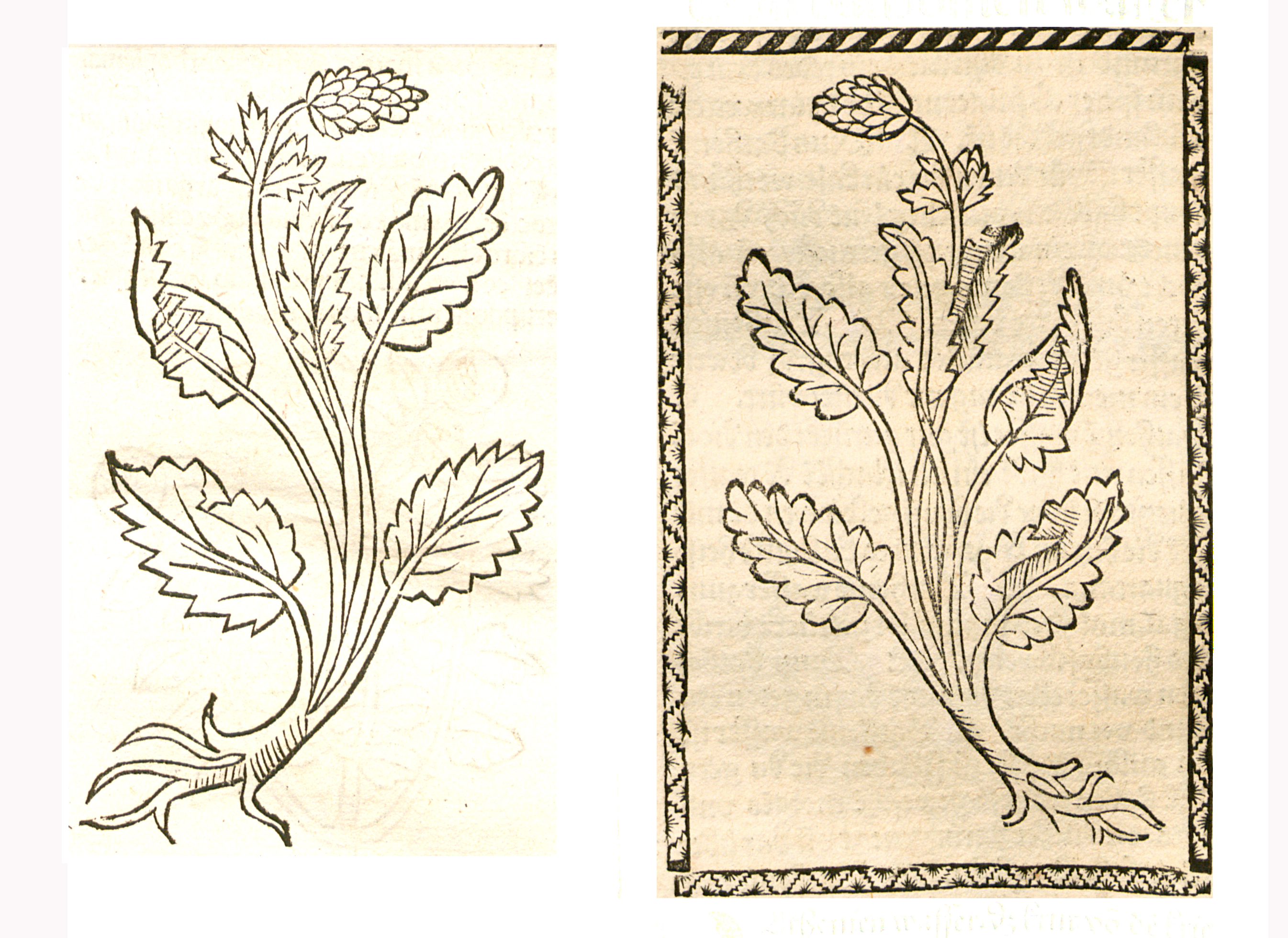 Abbildung von Batonien (Betonica officinalis)